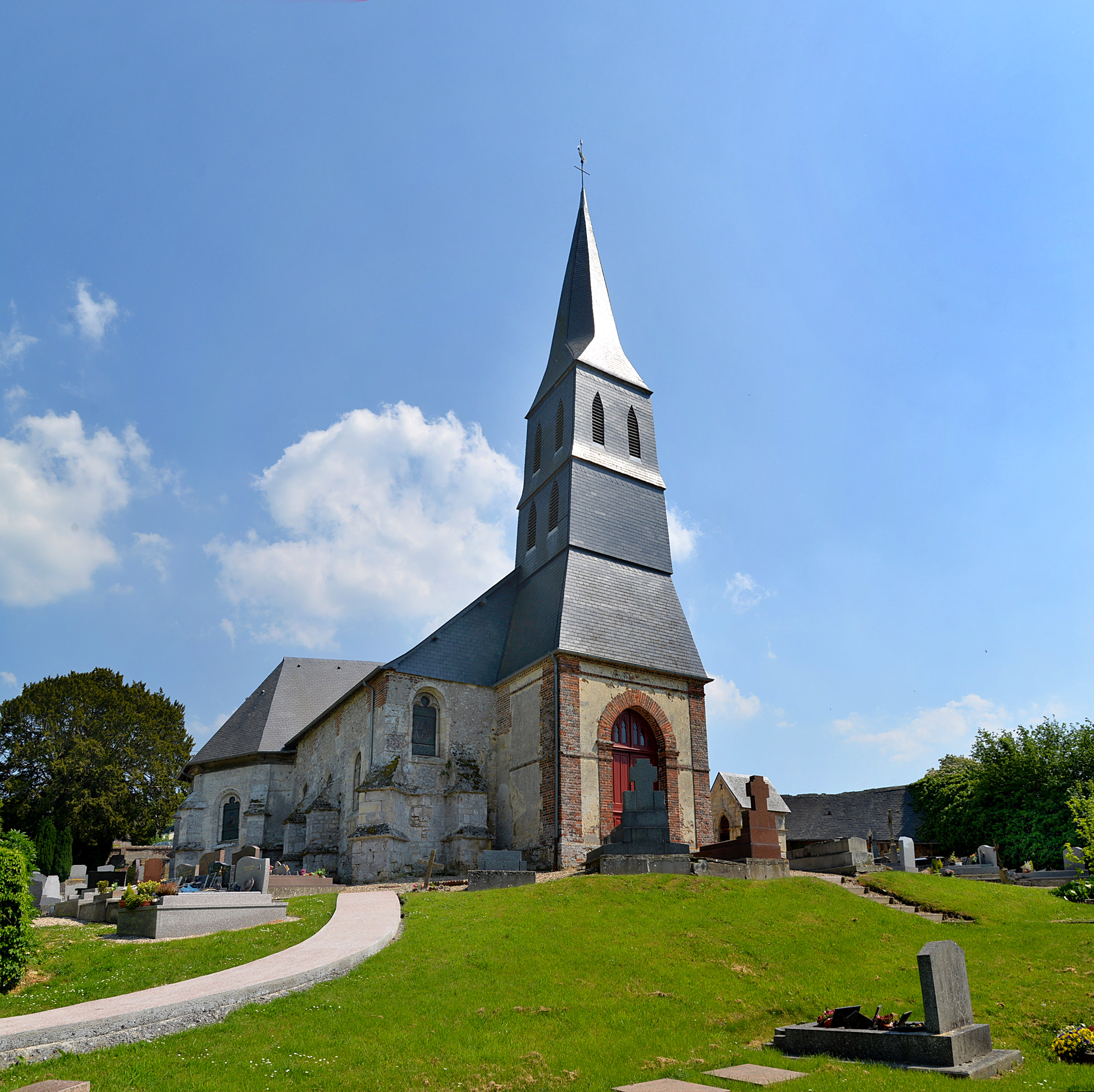 Manneville-la-Pipard (Calvados)